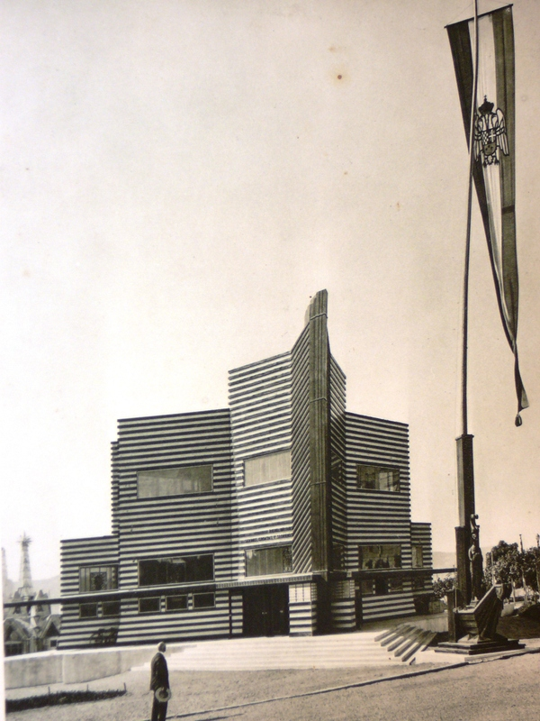 Exposición Internacional de Barcelona (1929). Pabellón de los Reinos Serbio, Croata y Esloveno.